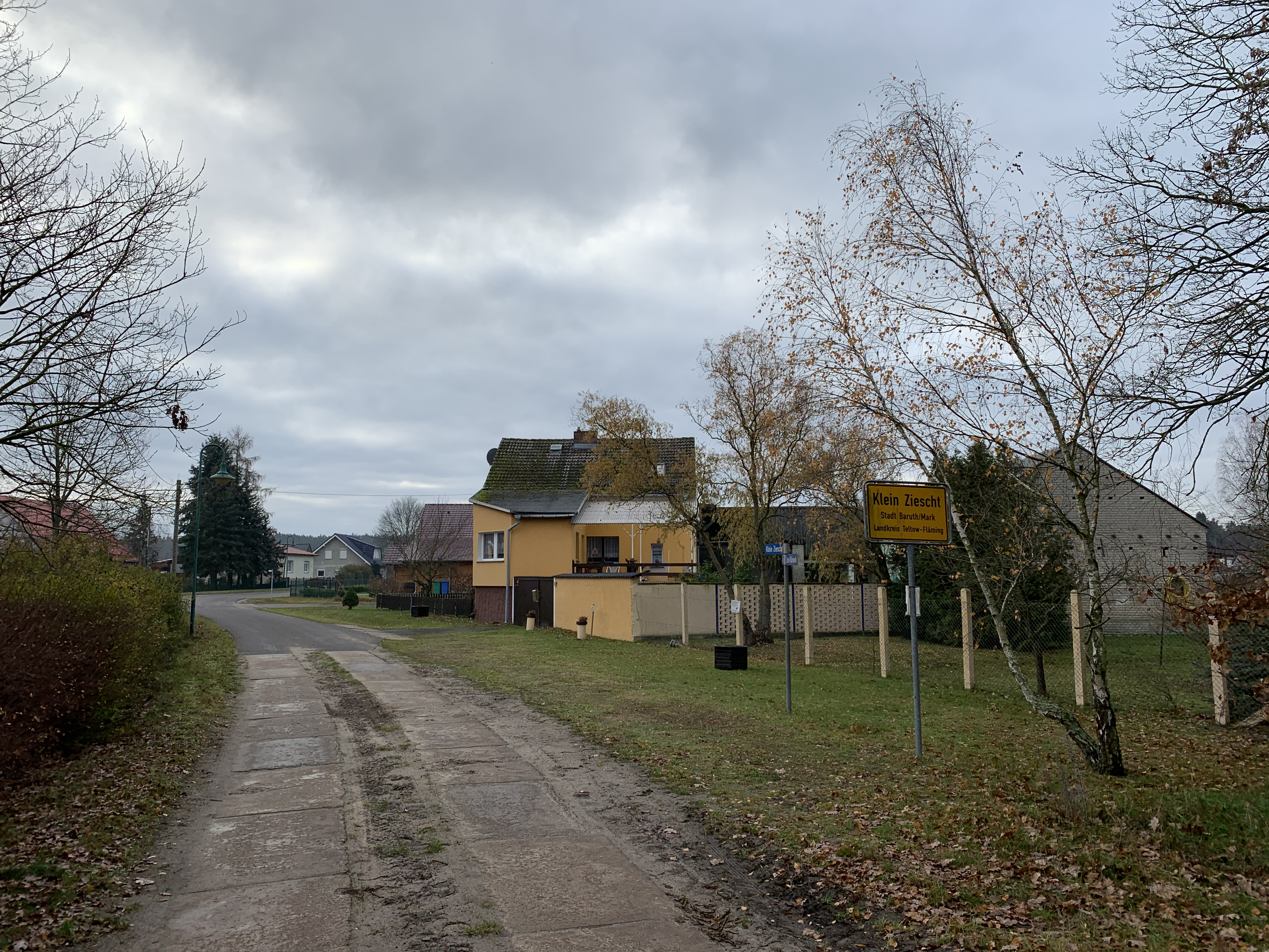 Klein Ziescht, ein Ortsteil von Baruth/Mark in Brandenburg